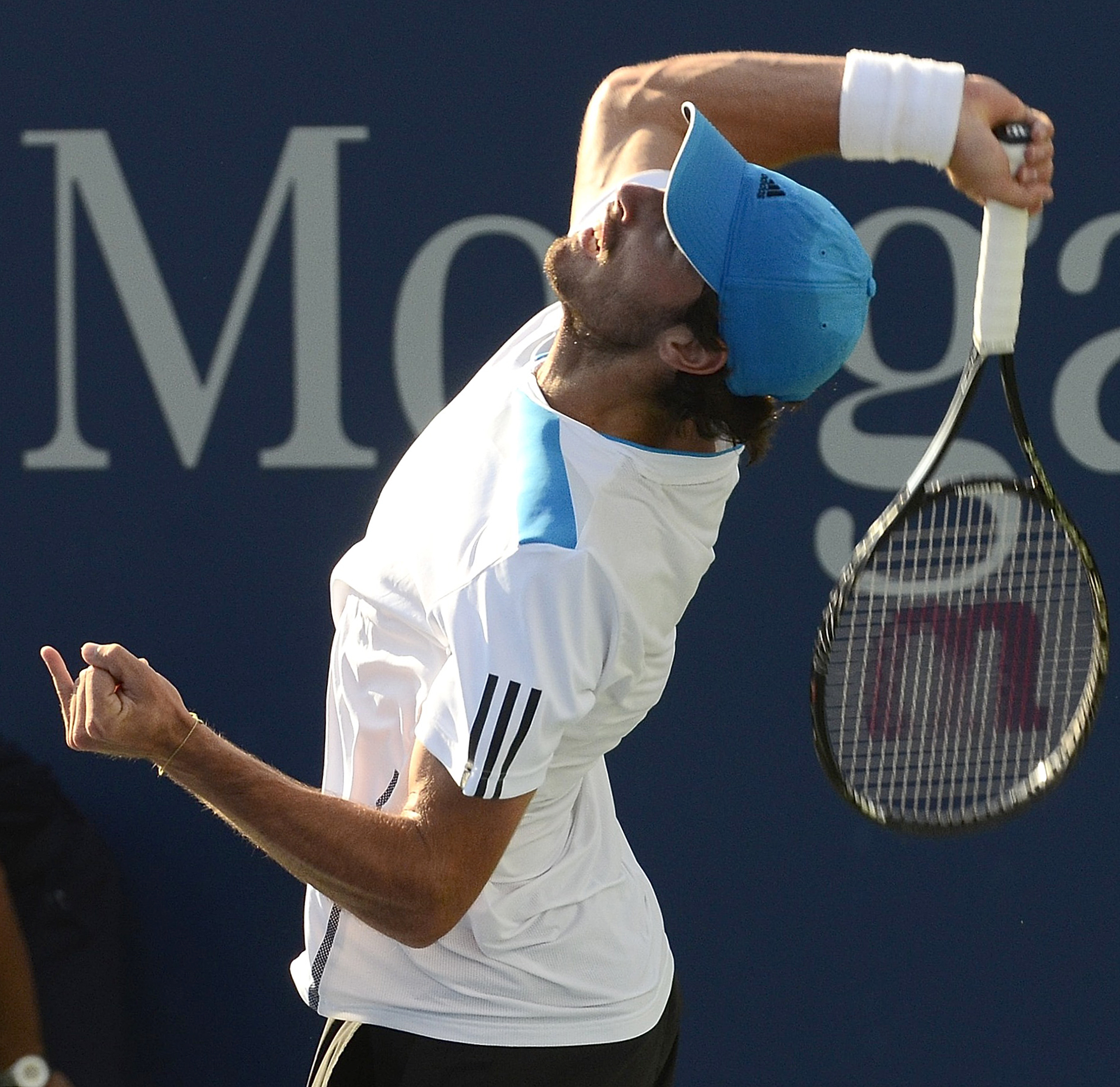 August 19, 2014 Queens, NY Juan Ignacio Londero (ARG) def.Ante Pavic (CRO)